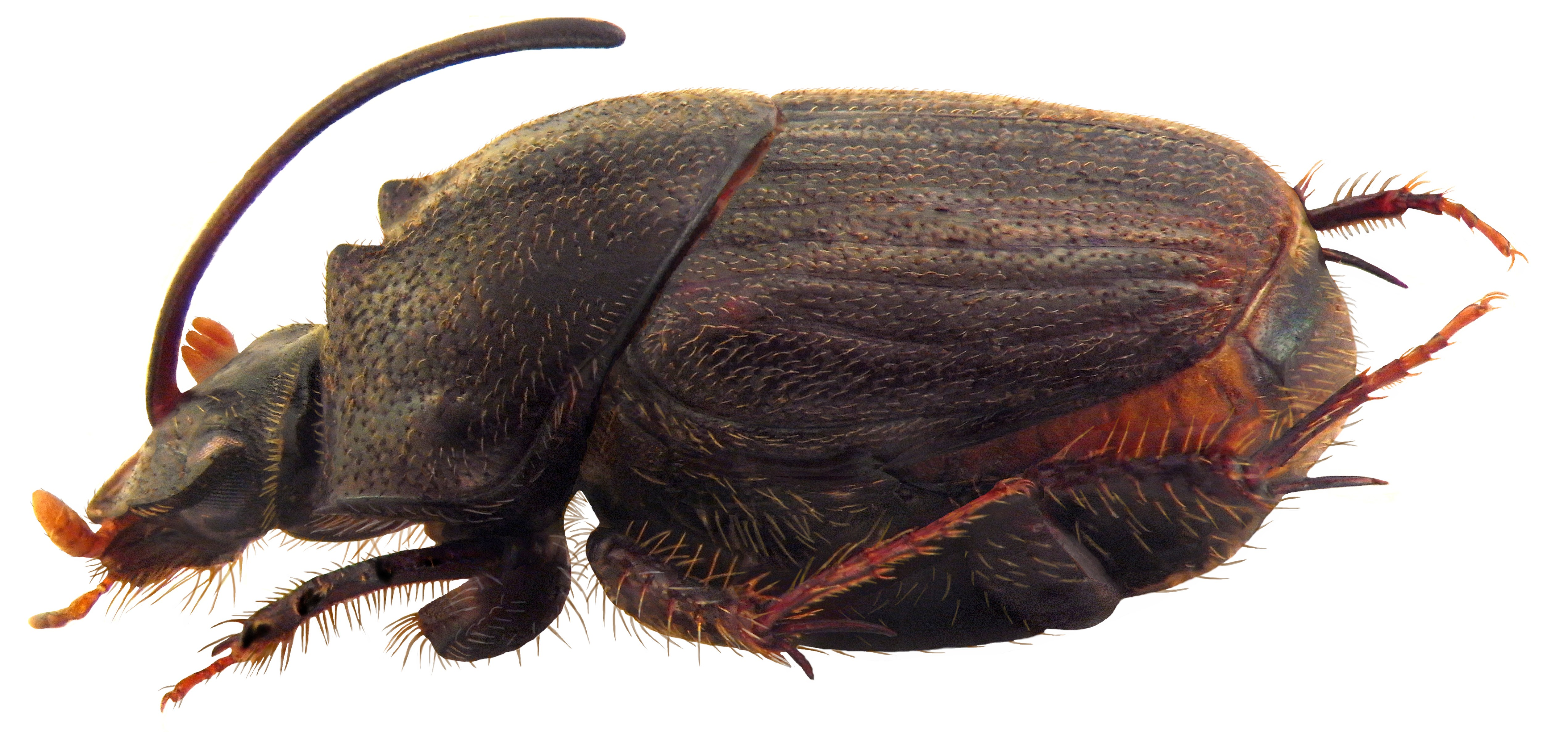 Familie: Scarabaeidae Groesse: 7,9 mm Fundort: Nepal, Bhojpur-District, Gothe to Maiwa leg. W.Schawaller, 1997; det. J.Scheuern, 2000 Photo: U.Schmidt, 2010